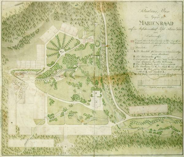 Situační plán úprav mariánskolázeňského parku od Václava Skalníka.